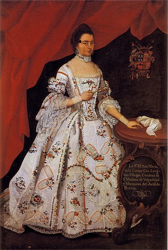 Retrato de Ana Maria de la Campa y Cos (1734-1804), II condesa de San Mateo de Valparaiso y marquesa de Jaral de Berrio